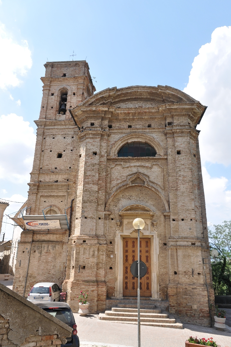 Rosciano 2012